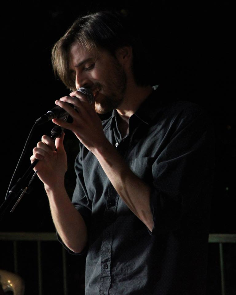 הופעה במרפסת, מוזיקה בבית, ירושלים